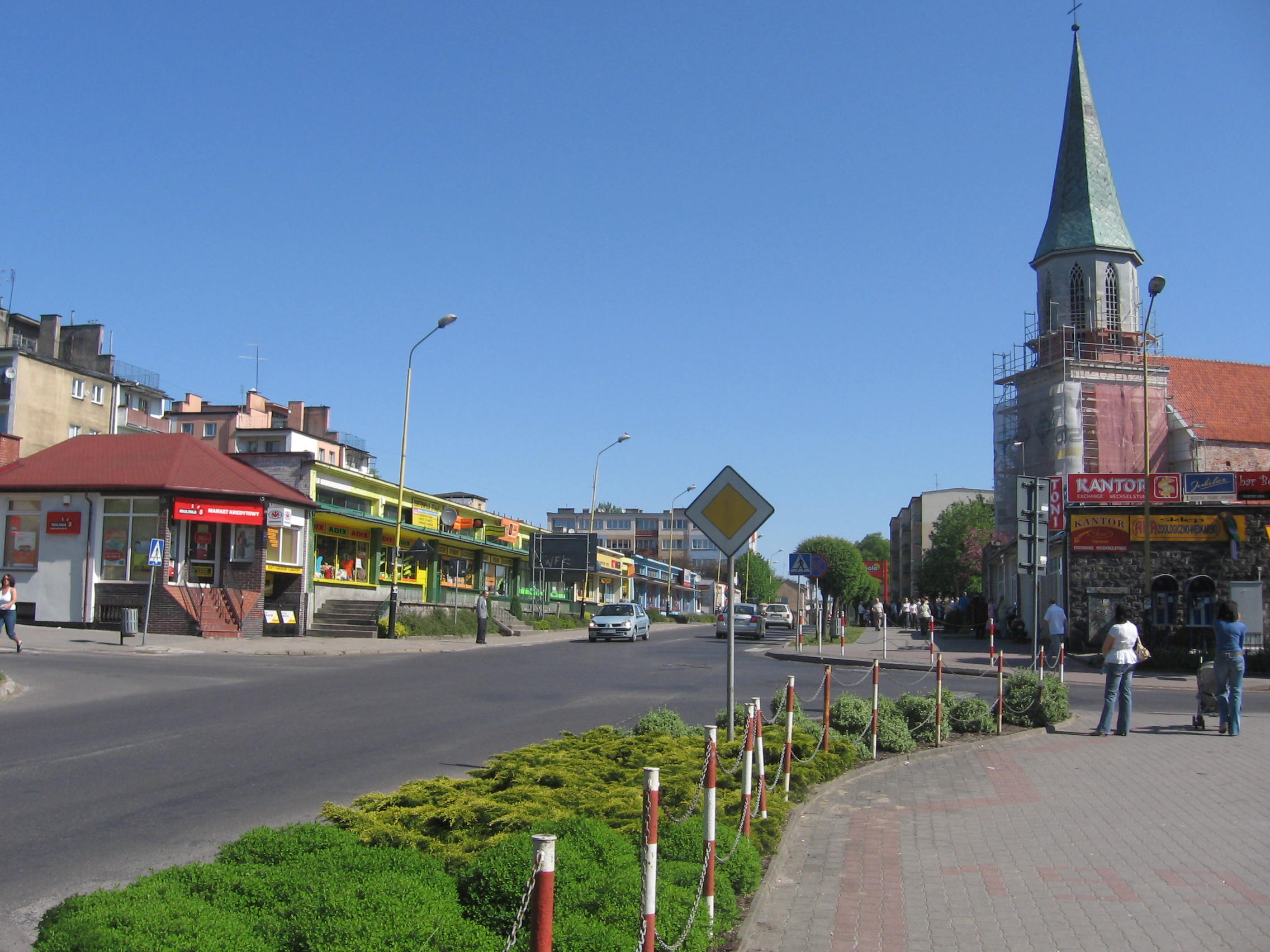 Jedna z głównych ulic Łobza z widocznym kościołem One of the main streets in Łobez